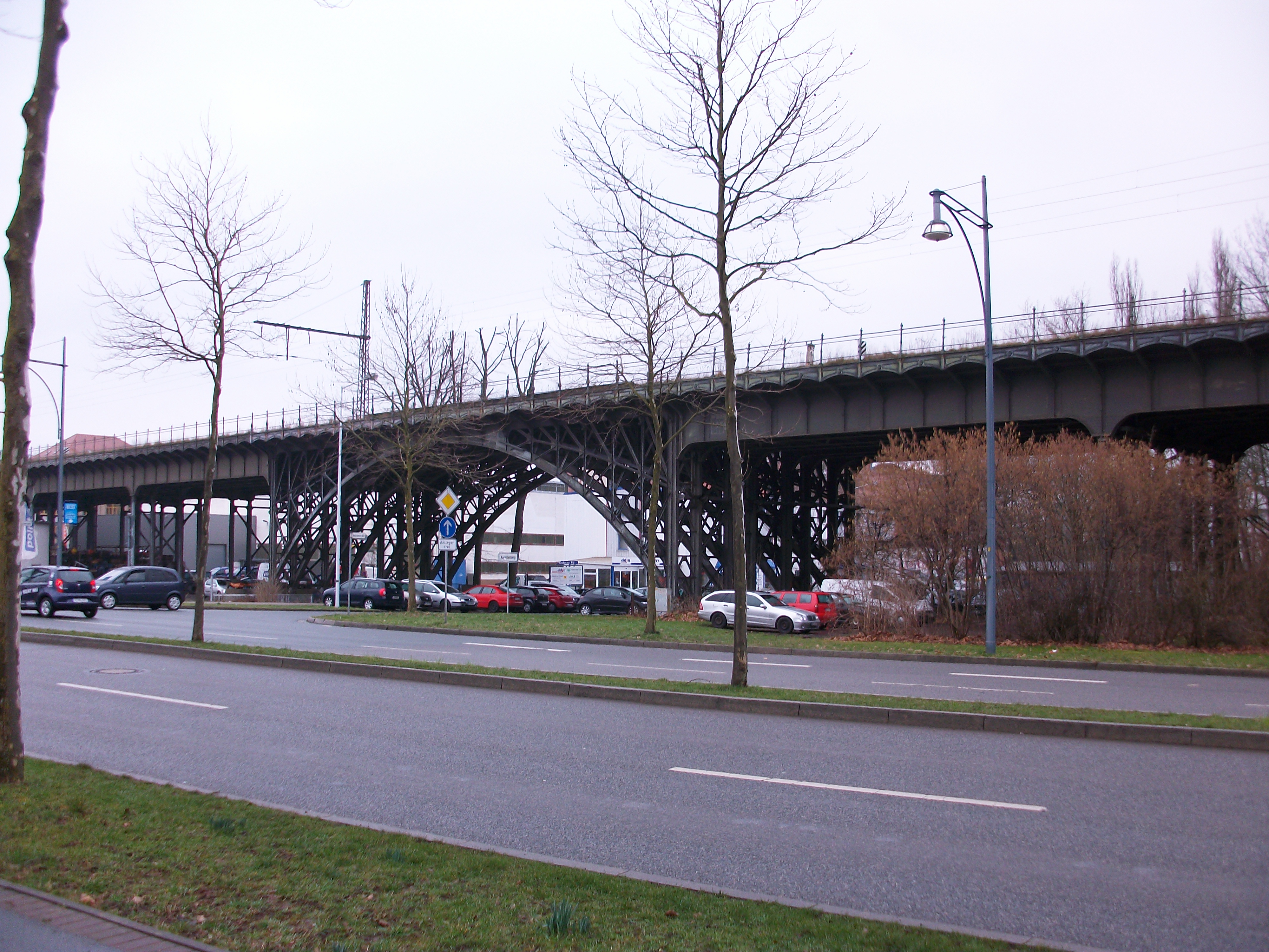 Bahnbrücke Annaberger Straße in Chemnitz (2016)